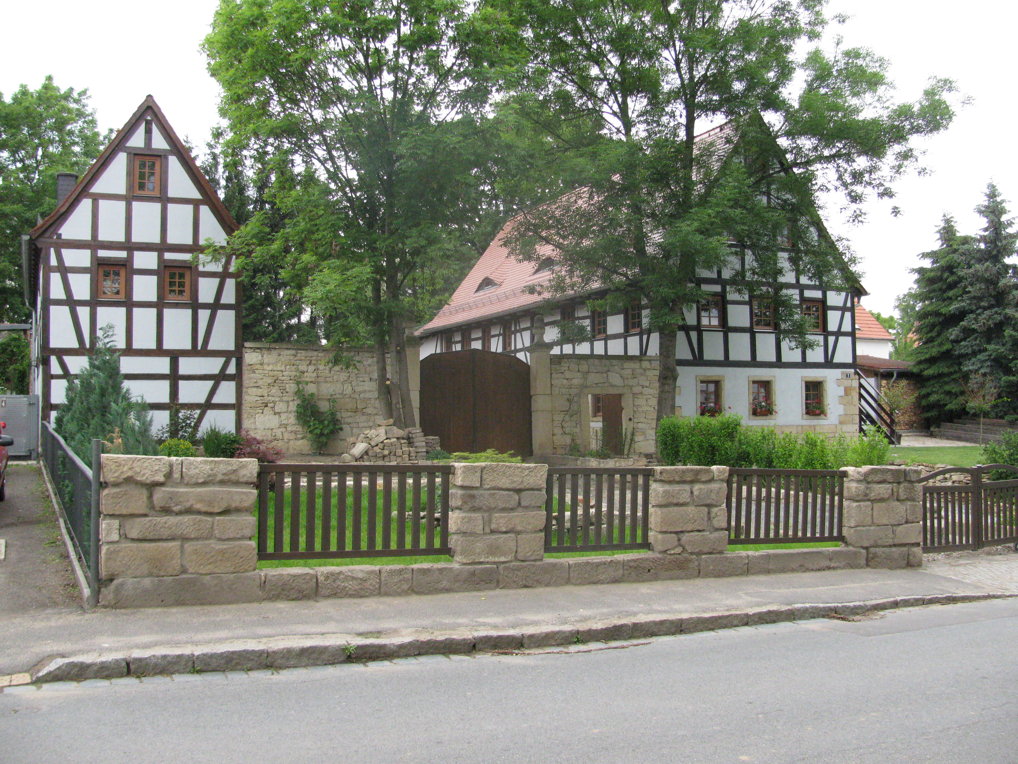 Gebäude in Alttorna, Stadtteil Torna, Landeshauptstadt Dresden